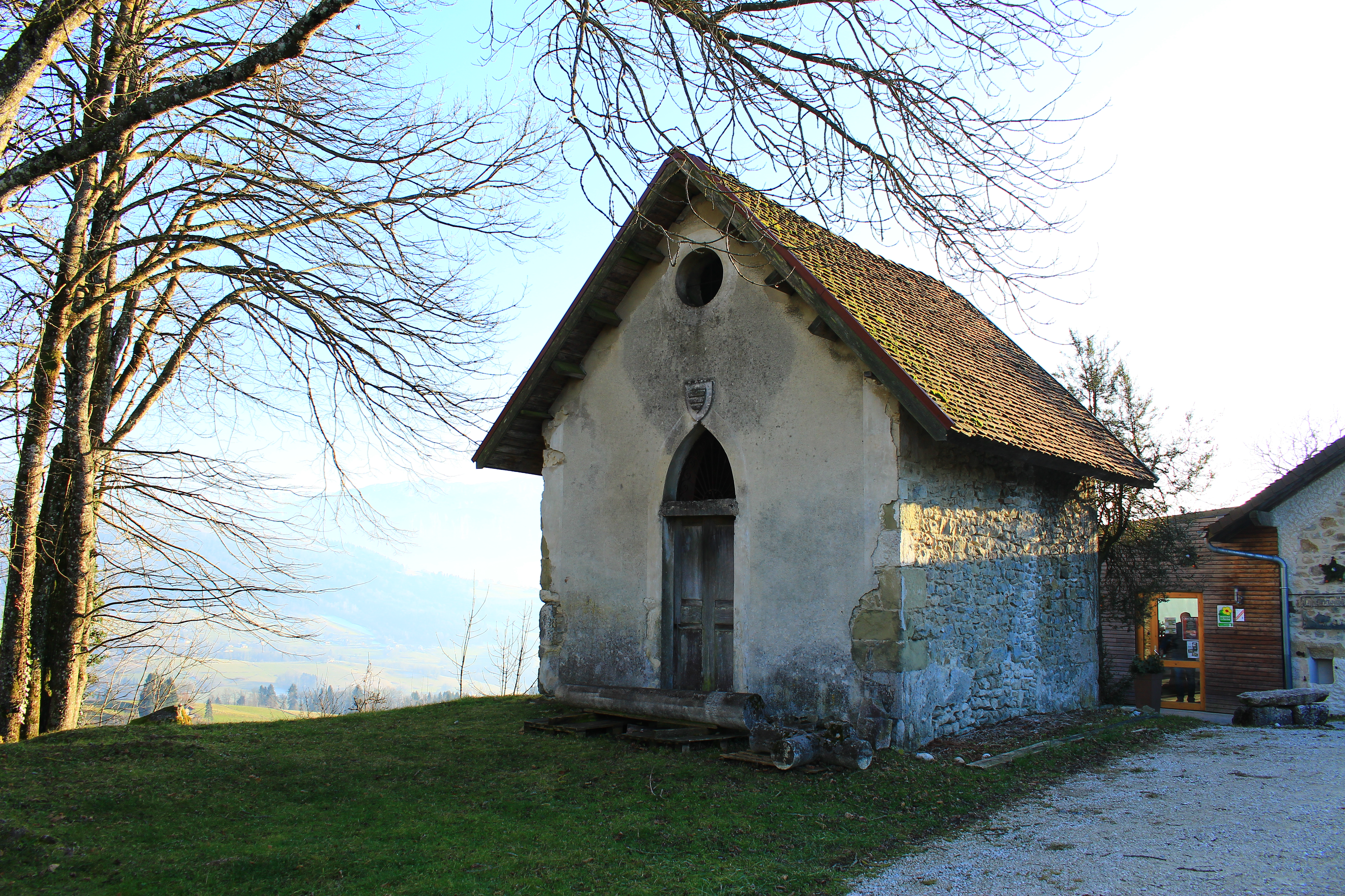 La Chapelle de Corbeau de Vaulserre, construite en 1902 avec les restes de l'ancienne église de Saint-Franc, à l'emplacement exact où se trouvait cet édifice, désormais disparu. Elle fut érigée sur ordre de Marie François Charles de Corbeau, Marquis de Vaulserre afin de maintenir la mémoire des membres défunts de la maison de Corbeau, Seigneurs de Saint-Franc, inhumés dans l'ancienne église. Saint-Franc (Savoie, France) Décembre 2016